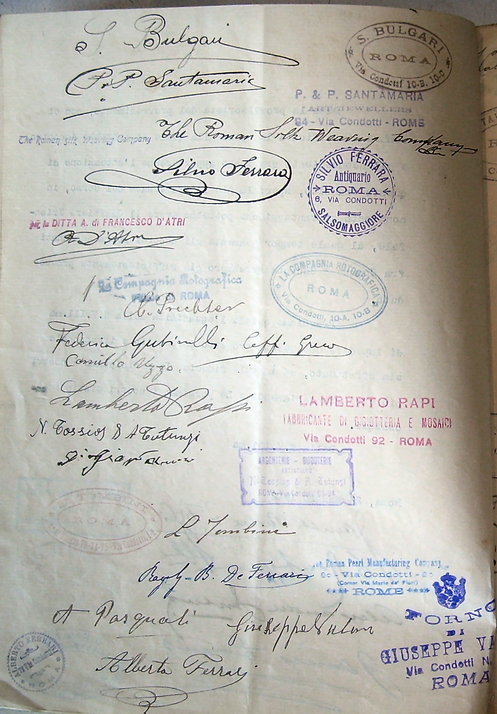 Commercianti di via dei Condotti - firrme 1913